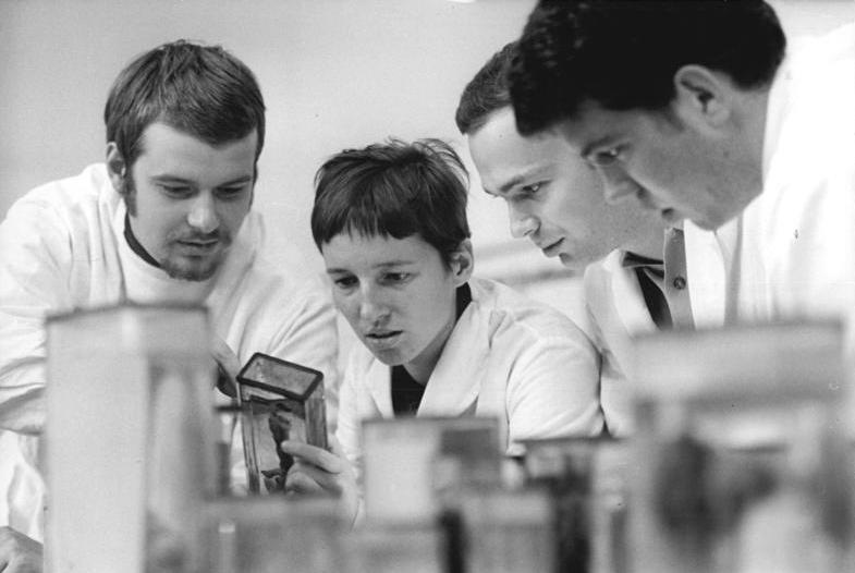 Leipzig, Universität, Veterinärmedizin Zentralbild Raphael 20.11.69-ste-Leipzig: Studenten im Lenin-Aufgebot- Zu Ehren des 100.Geburtstags Lenins haben die Mitglieder der Gruppe 2-4 der Sektion Tierproduktion- Veterinärmedizin der Karl-Marx-Universität Leipzig den Kampf um den Titel "Sozialistisches Studentenkollektiv" aufgenommen. Peter Heilmann, Christine Freysoldt, Frank Möbius und Klaus Schoppmeyer (vlnr) werden mit dabei sein, wenn ihre Gruppe Forschungsaufträge zu Lenins Leben erfüllt, wenn sie gemeinsam Filme, Theater und Leningedenkstätten besuchen. Im Fach Wissenschaftlicher Sozialismus wollen alle Studenten der Gruppe mindestens 2,0 erreichen.